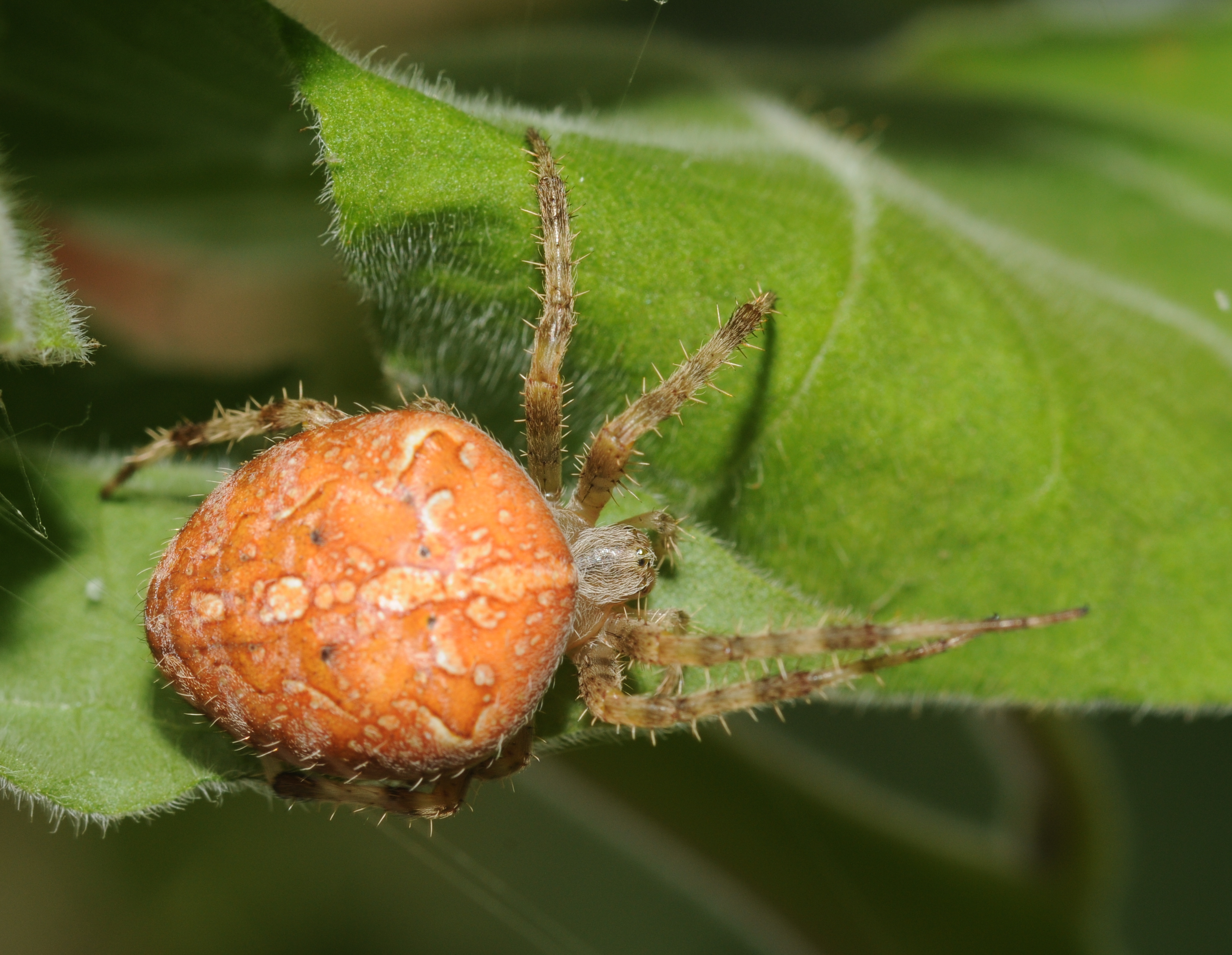 Épeire diadème